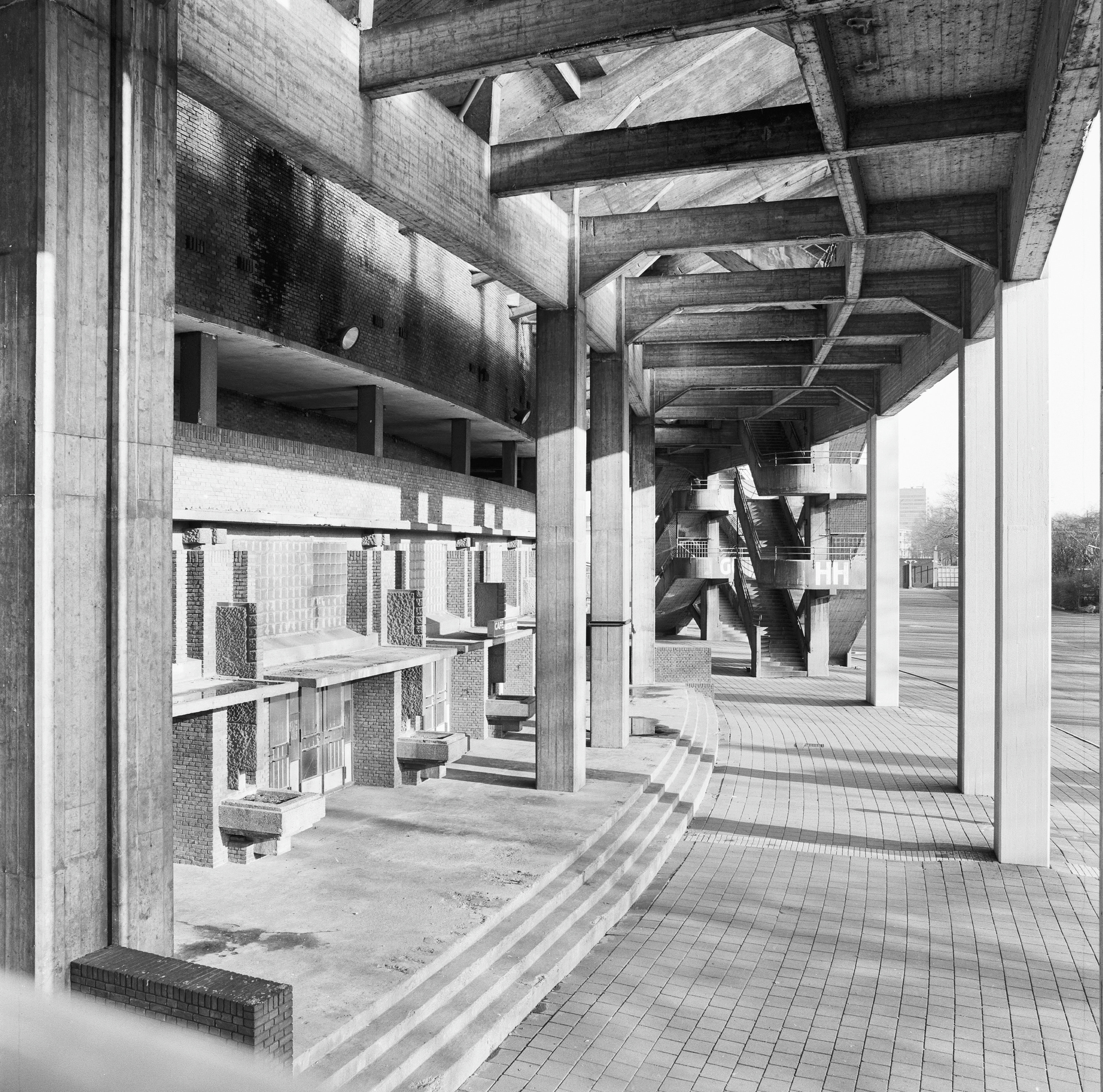 OLYMPISCH STADION: Exterieur OVERZICHT TRIBUNE, ZUIDZIJDE